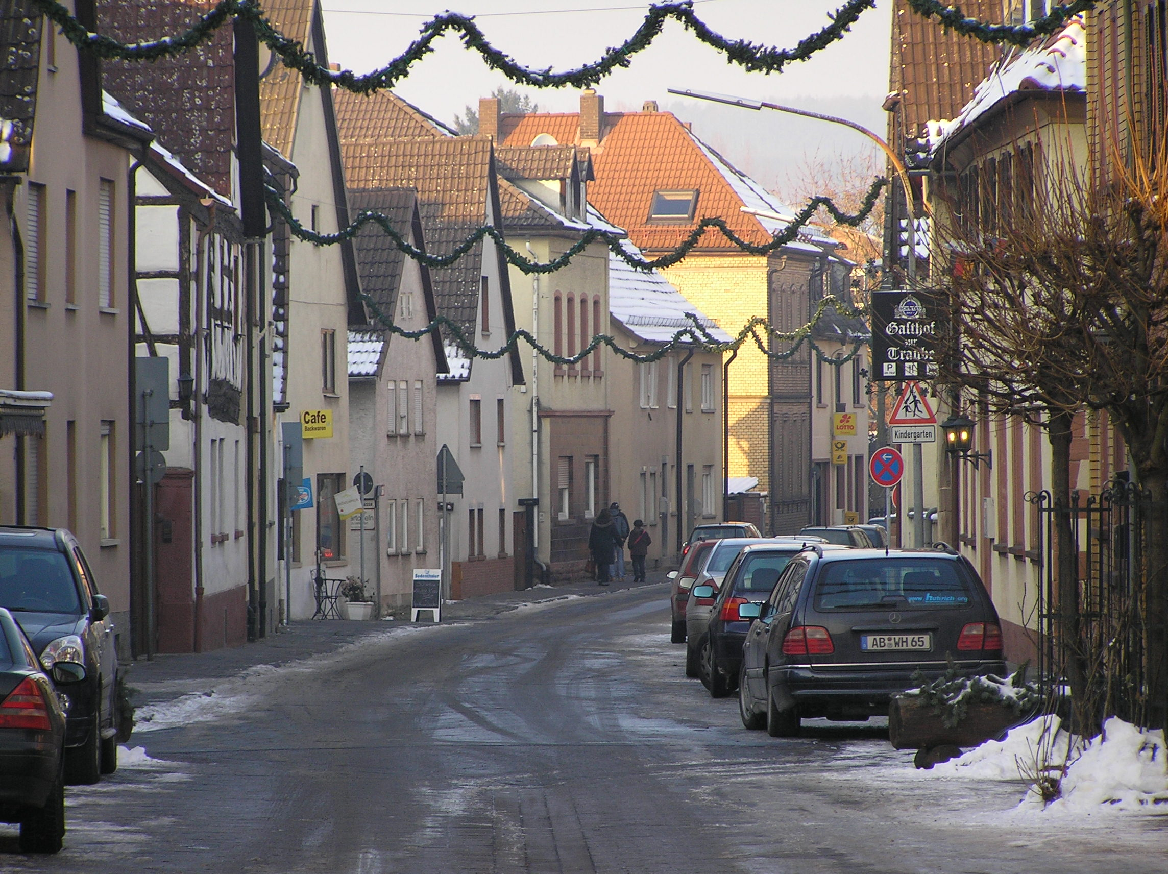 Die Hauptstraße in Kleinwallstadt Richtung Sulzbach im Winter